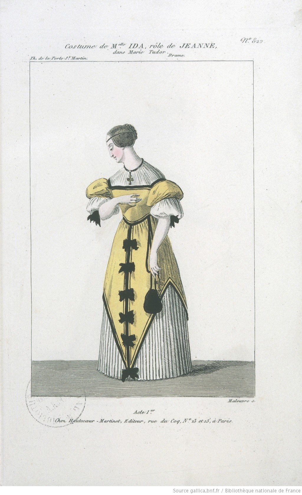 Titre : [Marie Tudor : lot d'estampes] Éditeur : Hautecoeur Martinet (Paris) Date d'édition : 1833 Format : Rec. factice ; 23 x 14,5 cm Identifiant